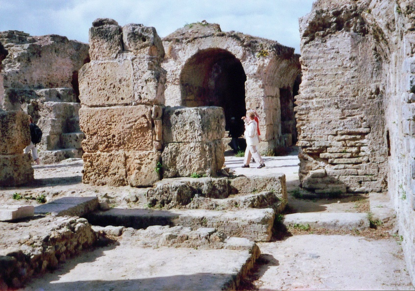 Ruinen von Karthago, eigenes Foto, selbst aufgenommen am 18. Mai 2005.